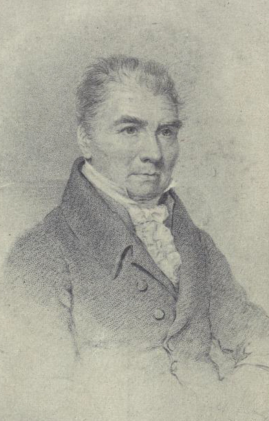 Y gramadegydd, geiriadurwr a golygydd Cymreig Dr William Owen Pughe (1759 – 1835)